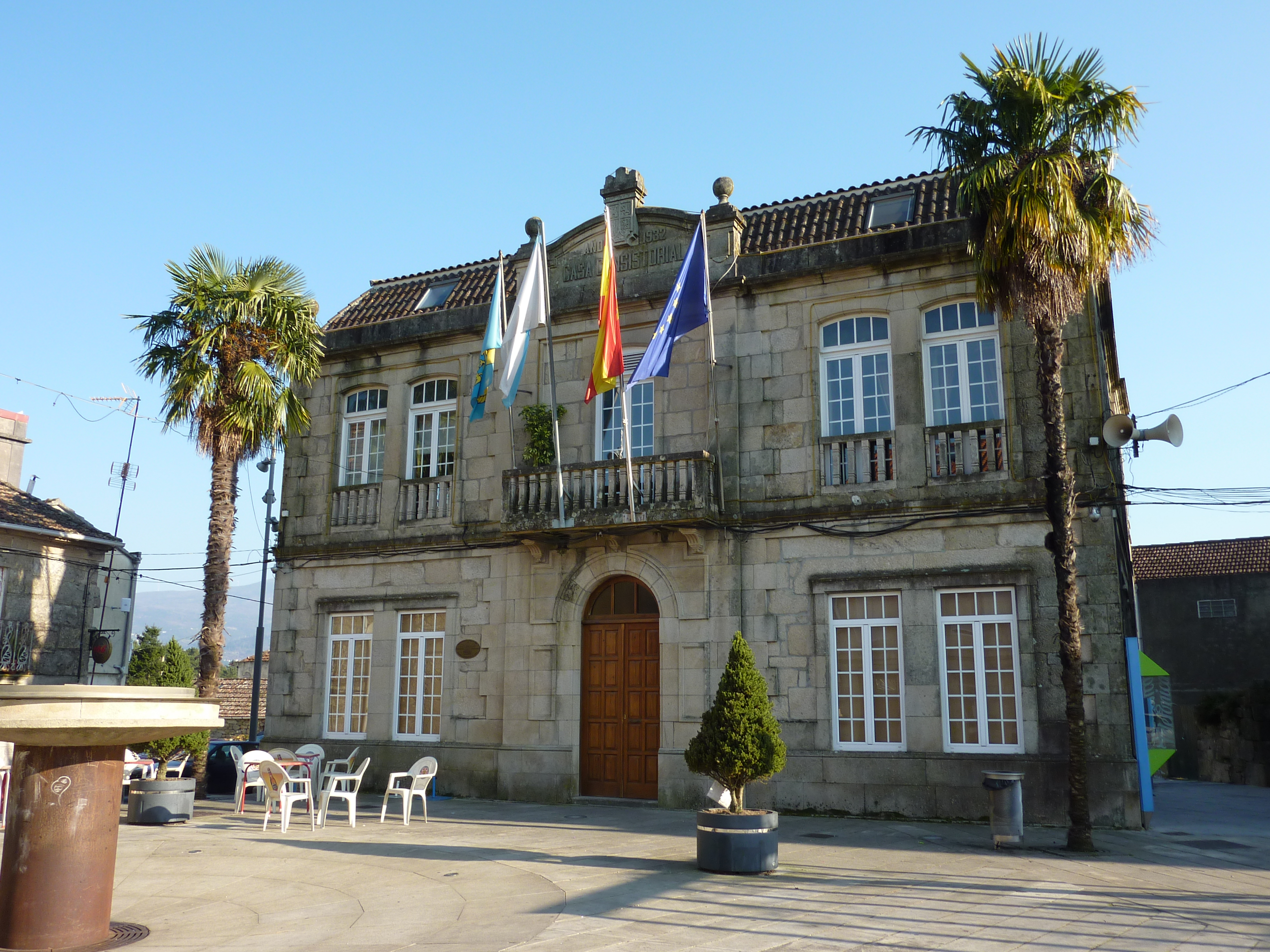 Foto del ayuntamiento de ArboGalego: Foto do concello de Arbo